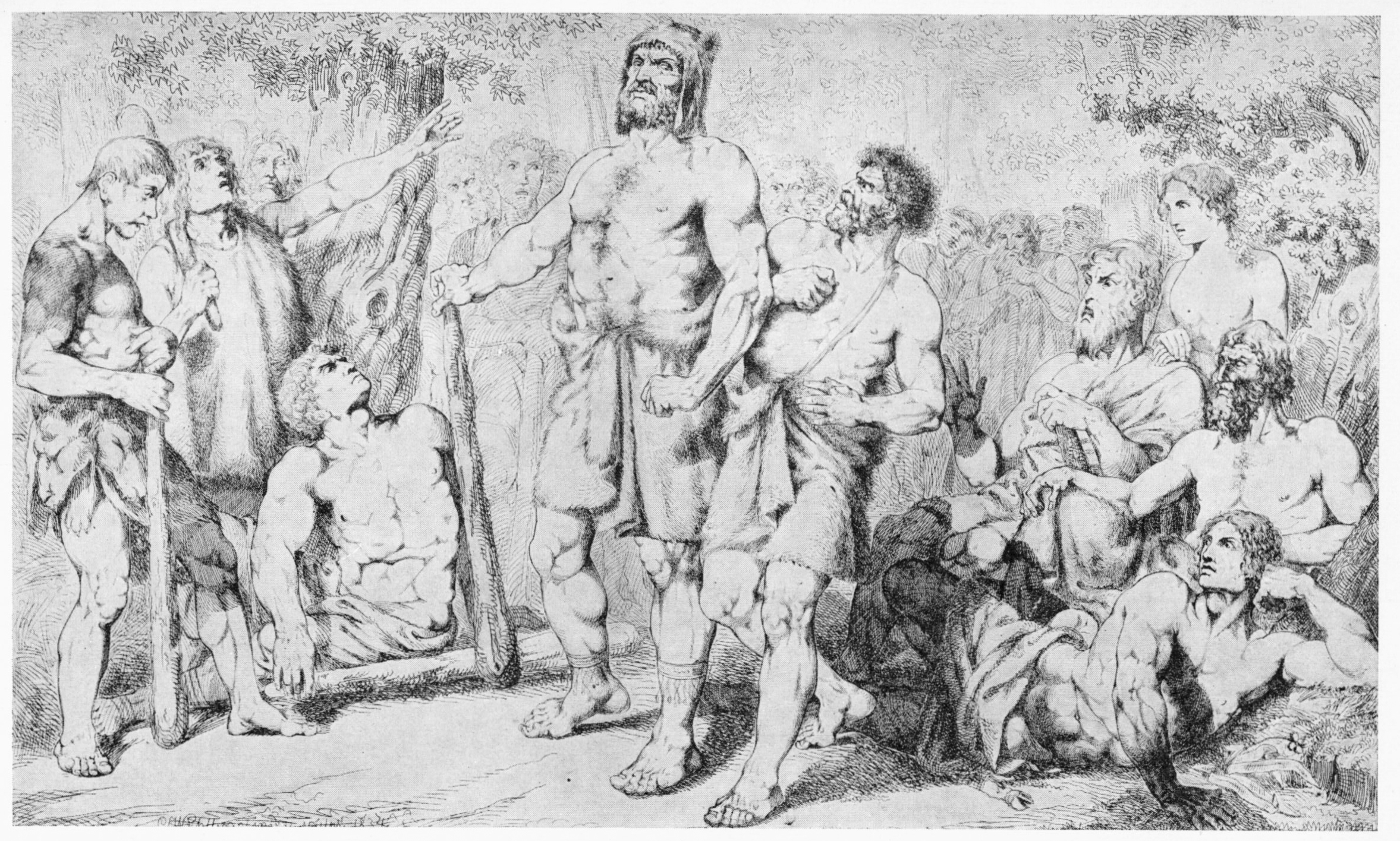 »Han uppsteg; vid talarn han kapprak sig ställde . ..» Från Carl Wahlboms illustrationer till Lings »Asarne». Den här återgivna raderingen illustrerar »Dumbers tvist med Storkvid, under jättarnas rådplägning vid valet till anförare»; den ingår i »Teckningar ur Asarne componerade och etsade af C. Wahlbom» 1833-1836